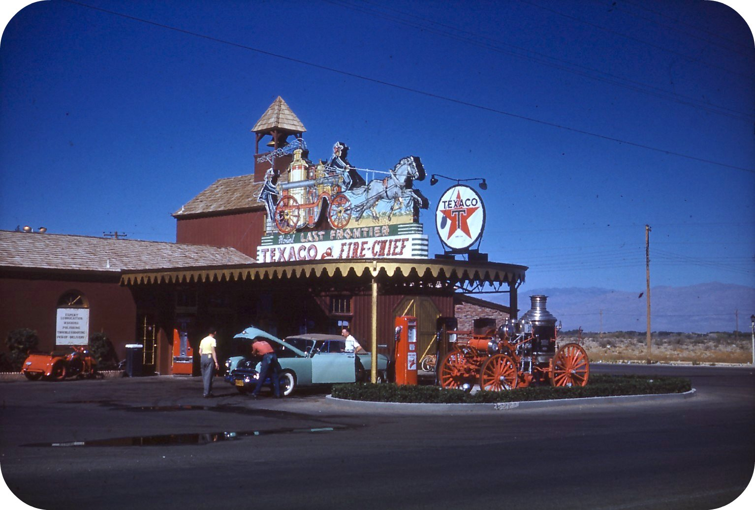 Last Frontier Hotel, Texaco gas station, antique fire engine.